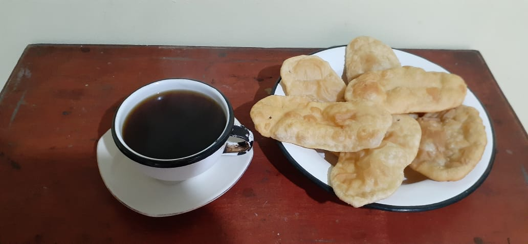 Desayuno puraceño